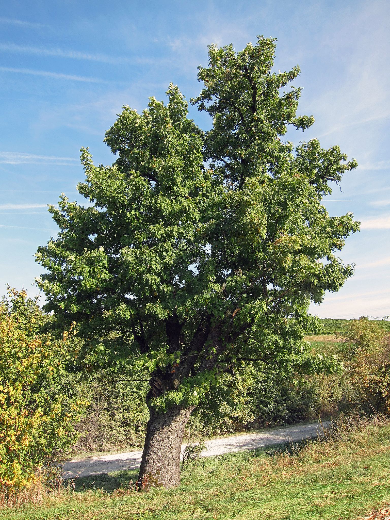 Speierling Castell